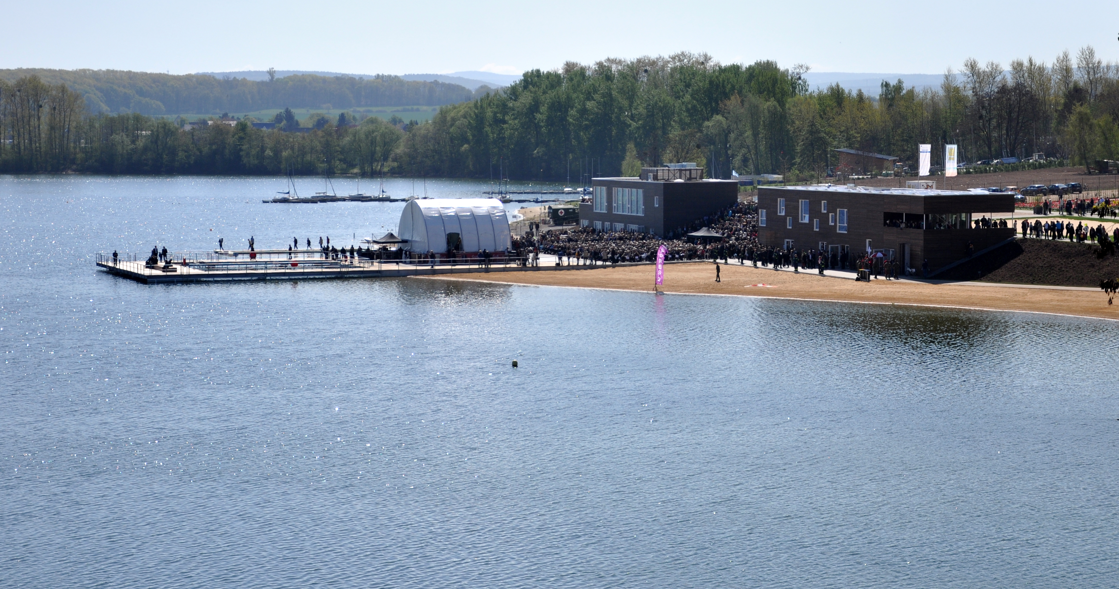 Landesgartenschau Zülpich 2014, Impressionen vom Eröffnungstag 16. April 2014